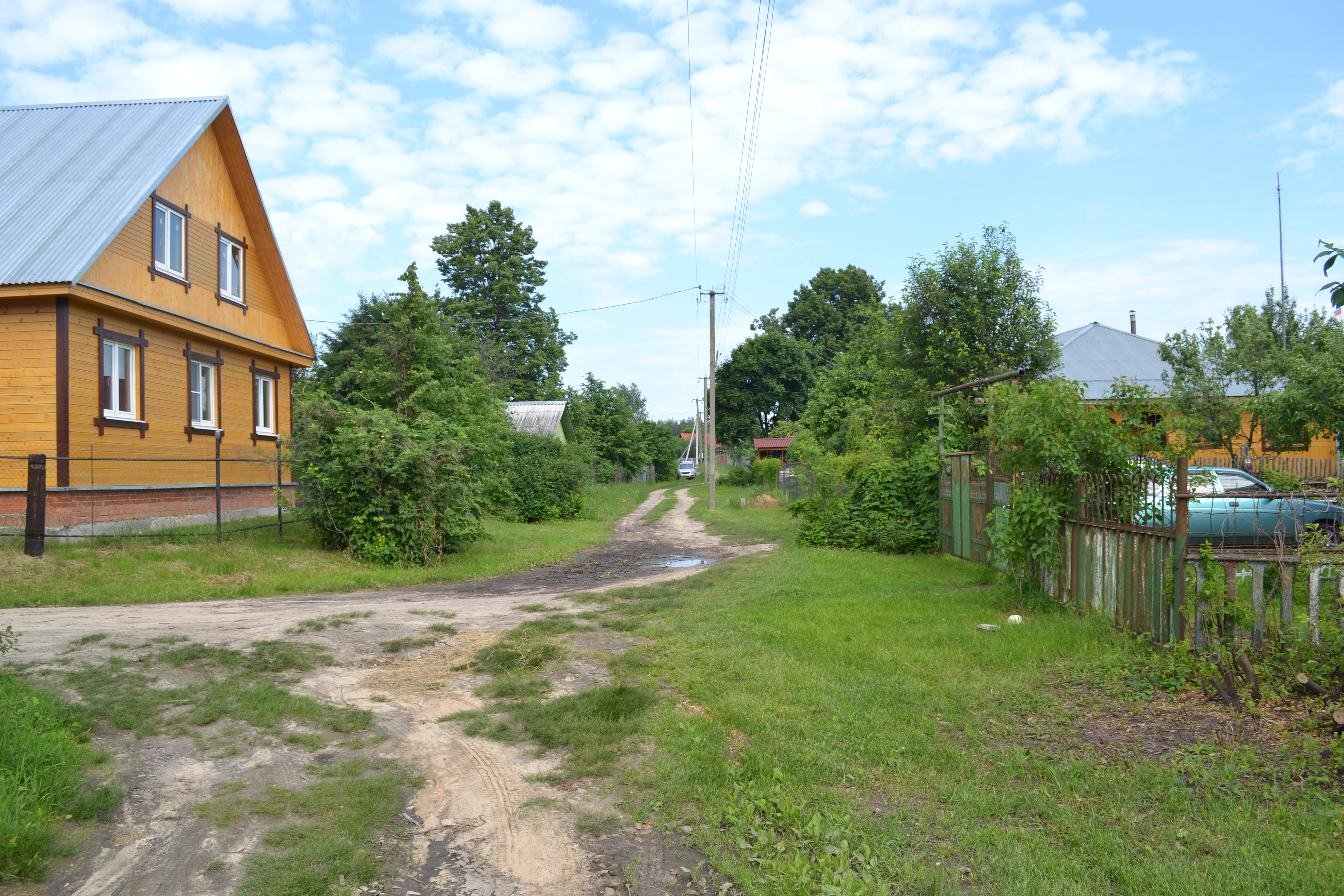 Южная часть Евлево (Шатурский район)